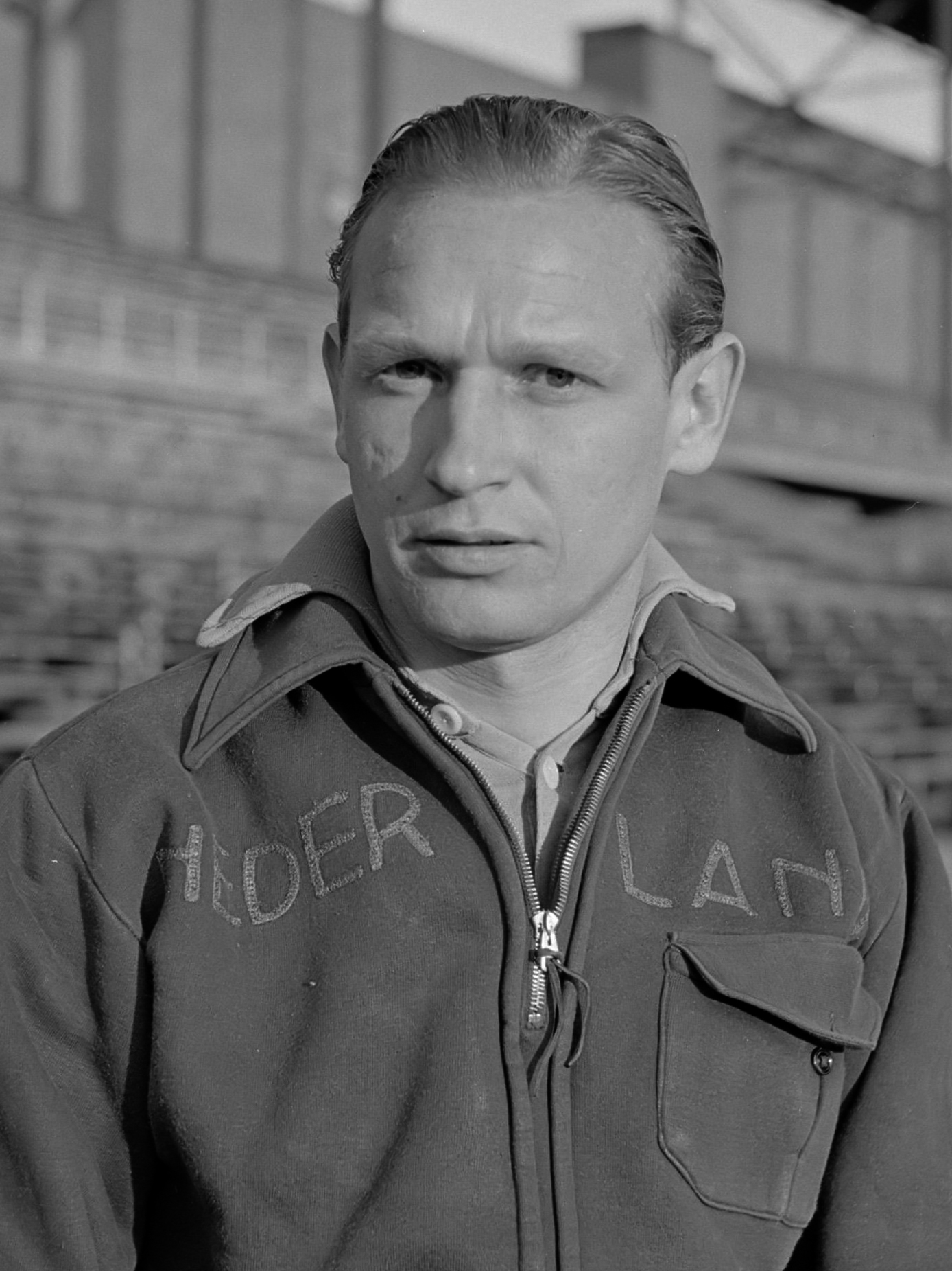 Nederlands voetbalelftal 1951. Aad de Jong (ADO) in het Olympisch Stadion in Amsterdam, enige dagen na de oefeninterland tegen België 24-4-1951